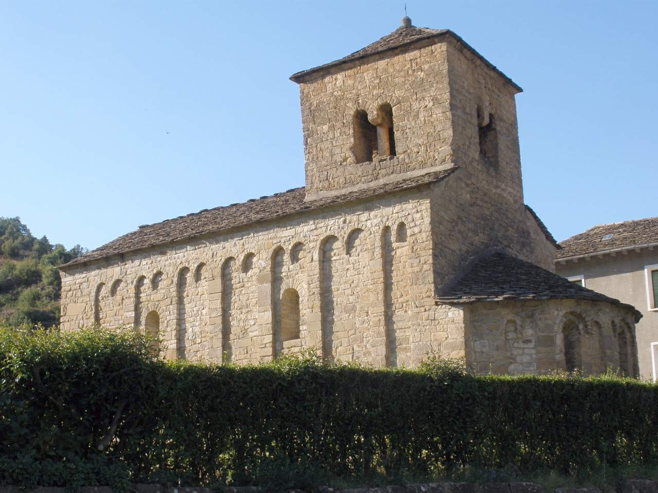 Iglesia de San Caprasio, en Santa Cruz de la Serós (Huesca)